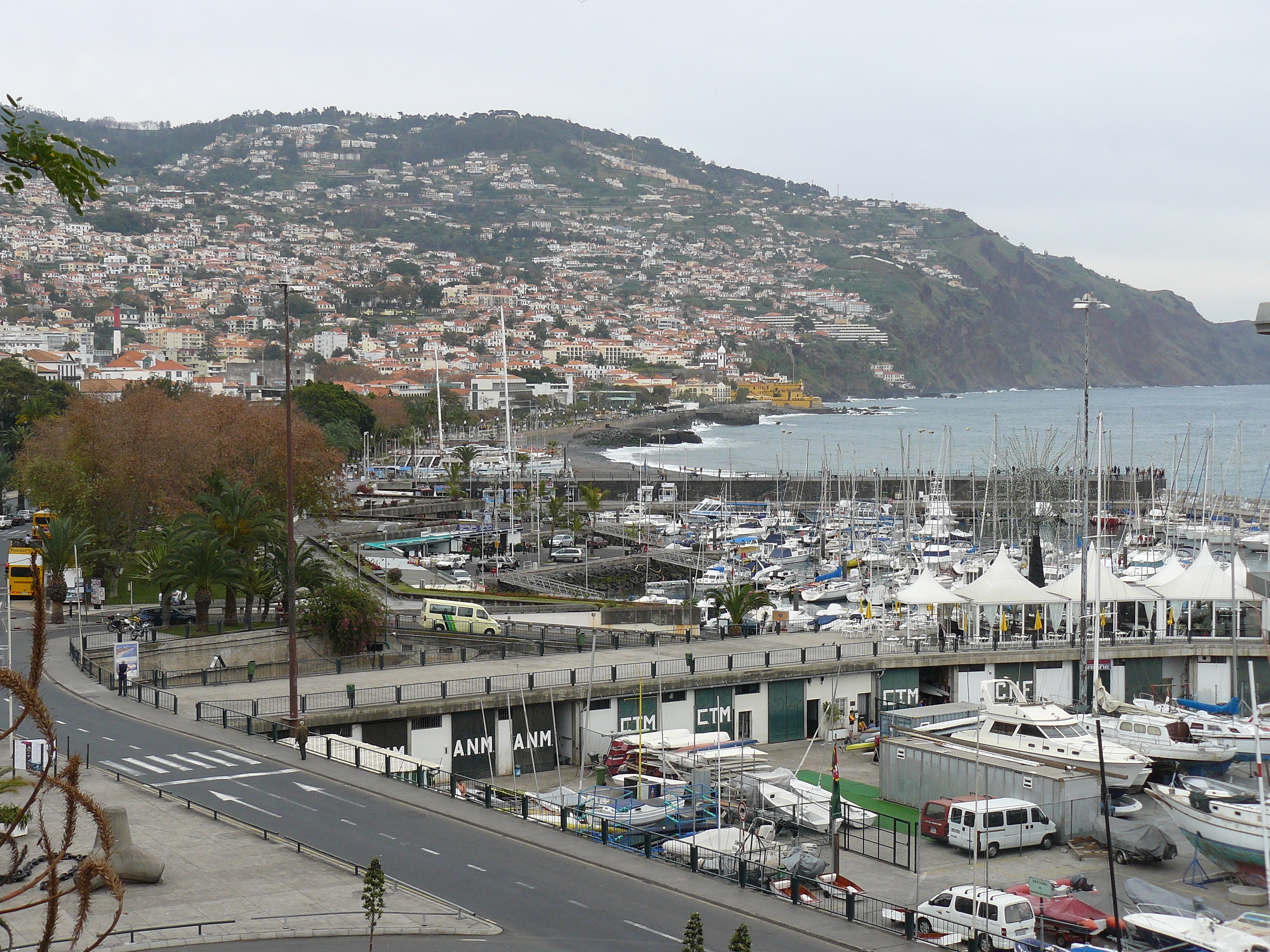 Funchal (Madère, Portugal): le port de plaisance au premier plan.